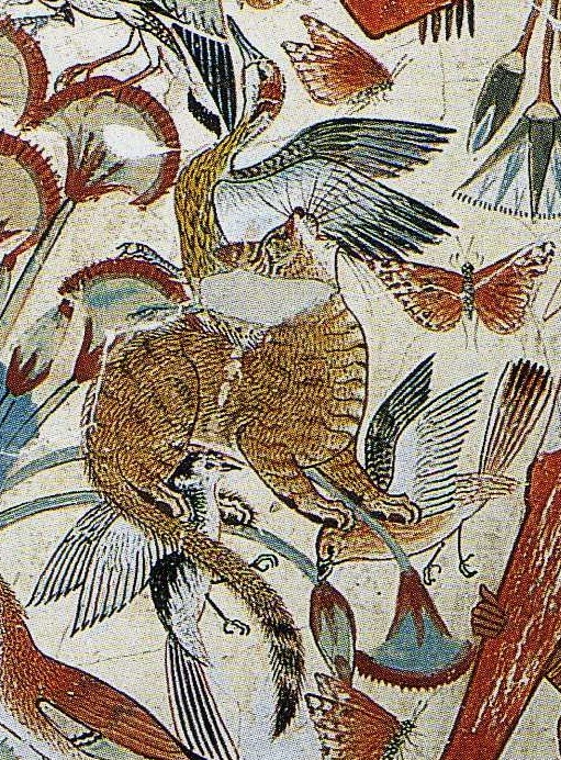 Jagd im Papyrusdickicht; Ausschnitt aus einer Wandmalerei im Grab des Nabamun in Theben-West, heute im British Museum, Tempera auf Putz, Höhe 81cm, 18. Dynastie, vor 1350 v. Chr.